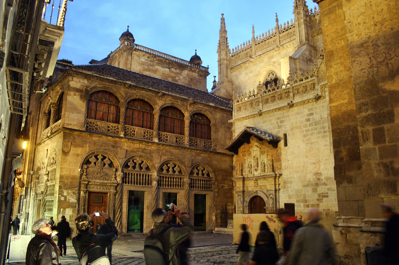 Granada, Spain.